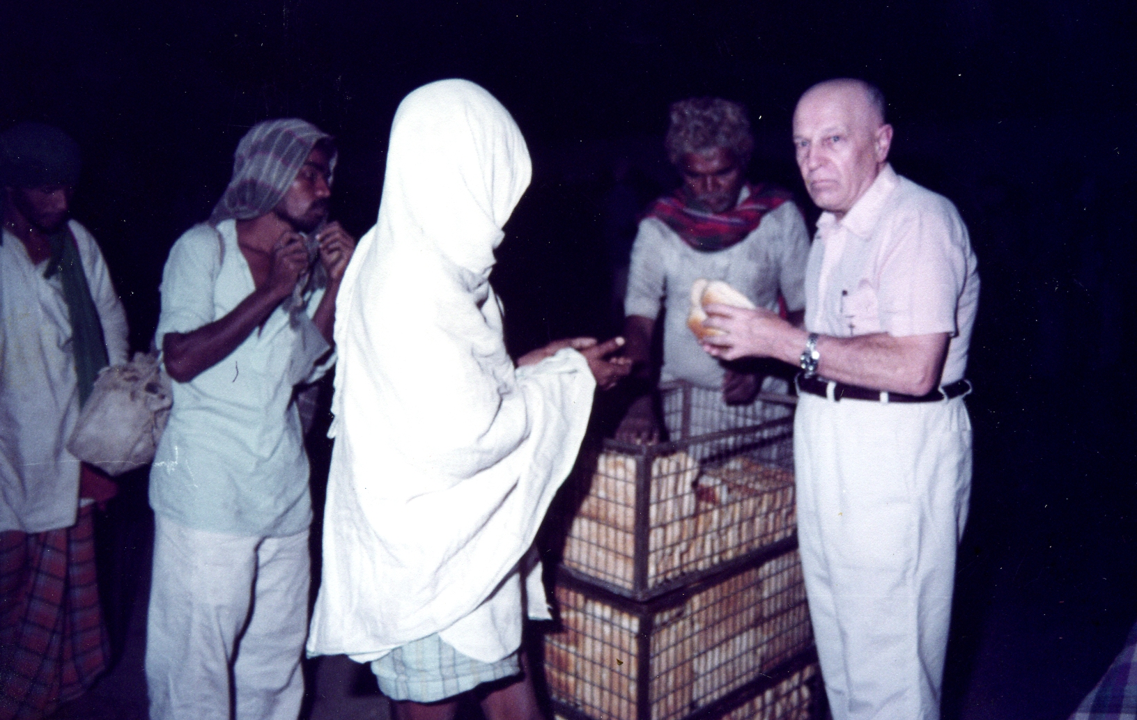 Don Antonio Maria Alessi, distribuzione aiuti